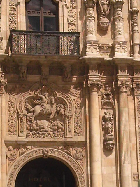 San Marcos de León. Detalle de la fachada principal.